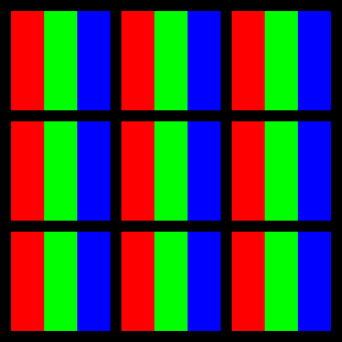 Die drei Grundfarben Rot, Grün und Blau der additiven Farbmischung bilden zusammen Weiß.